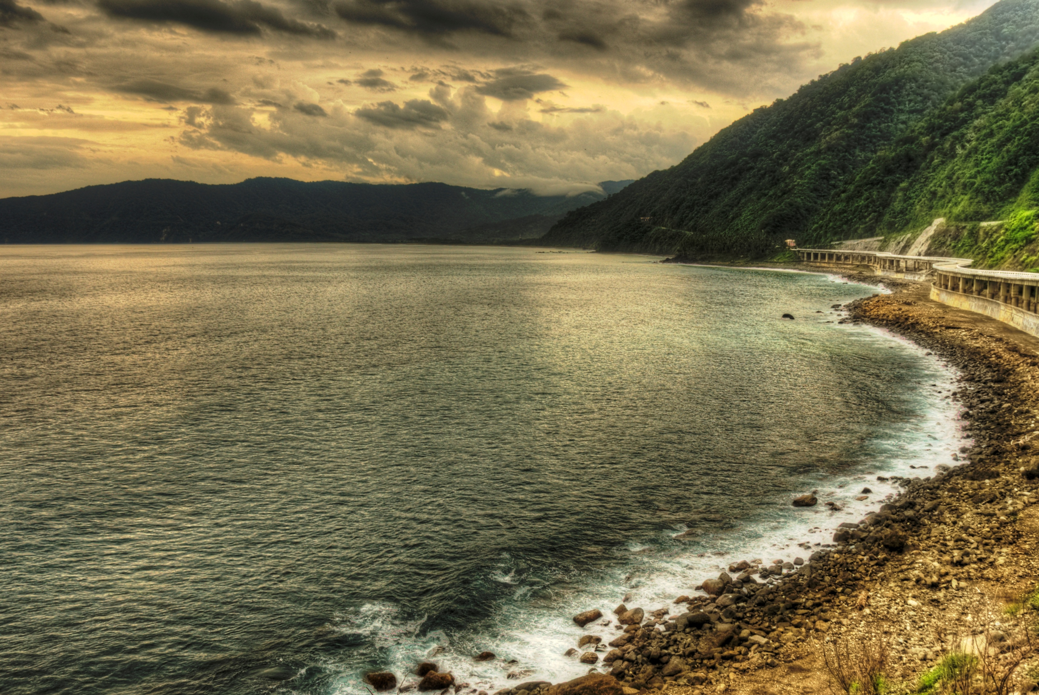 Pasaleng Bay and Patapat Viaduct